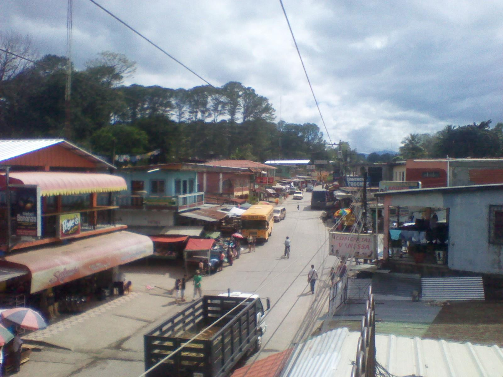 Vista panorámica, 2da Planta